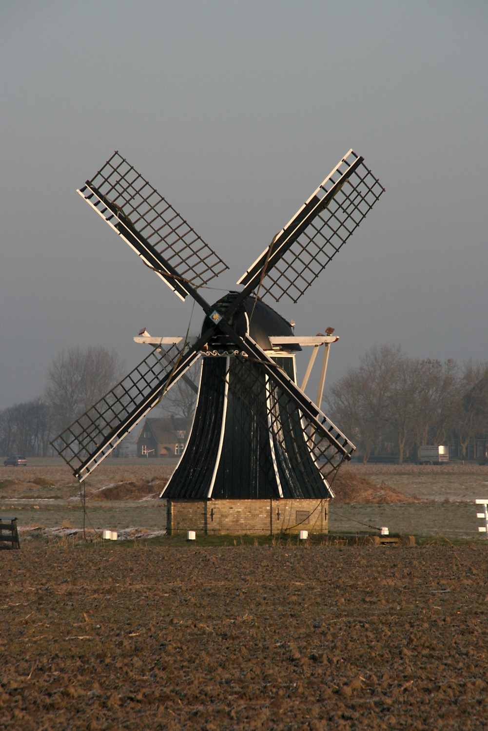 Dronrijp: Hatsumermolen